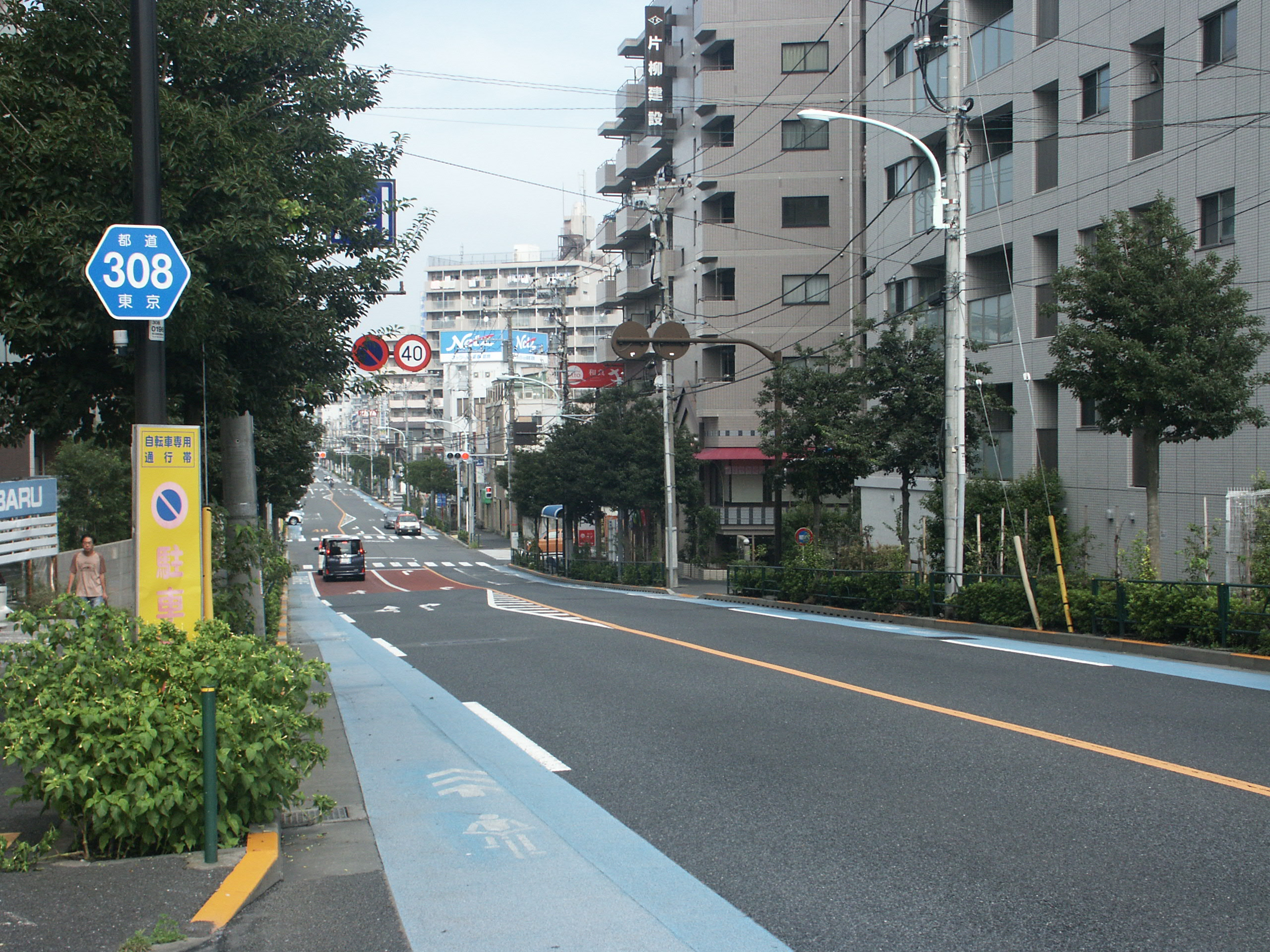 東京都道308号線葛飾区東四つ木２丁目付近（小菅方面を撮影）